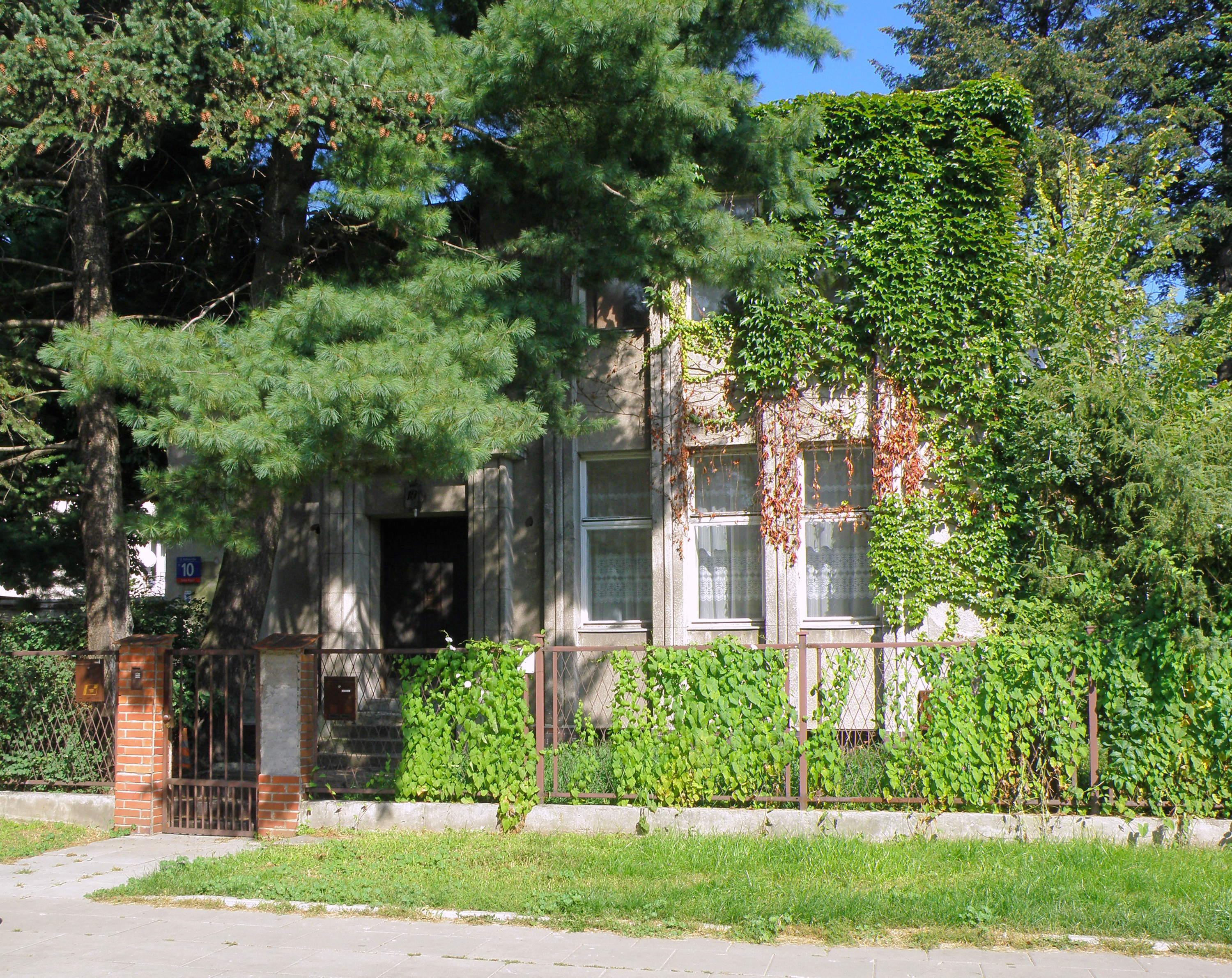 Dom, ok. 1930, ul. Katowicka 10 (952-A z 13.06.1979), Warszawa.